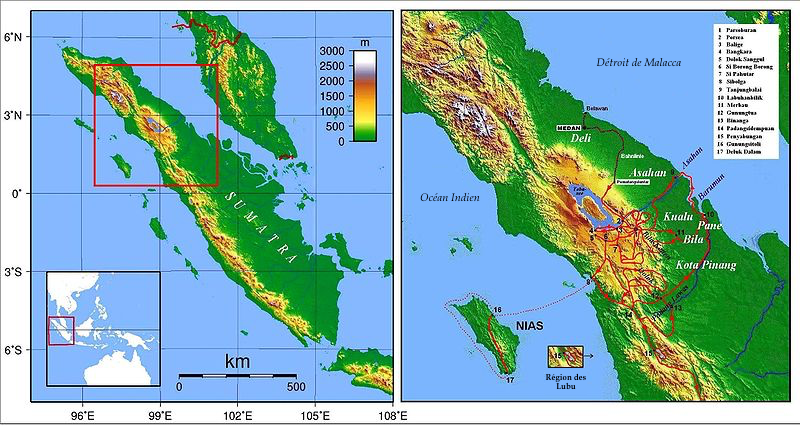 Voyages de Karl Helbig dans le noord de Sumatra